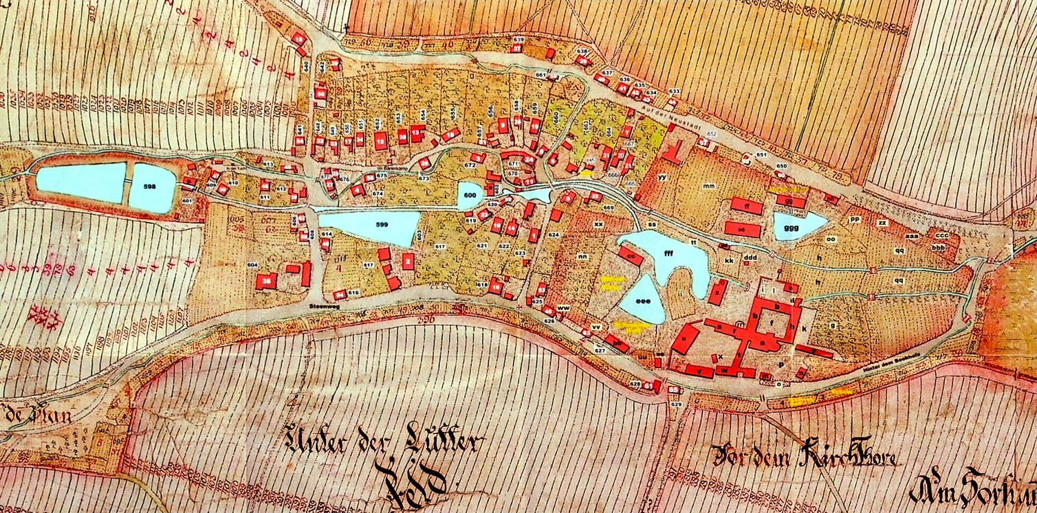 Historische Karte Willich von 1751, Wennigsen (Deister), 12e Nr. 86/3